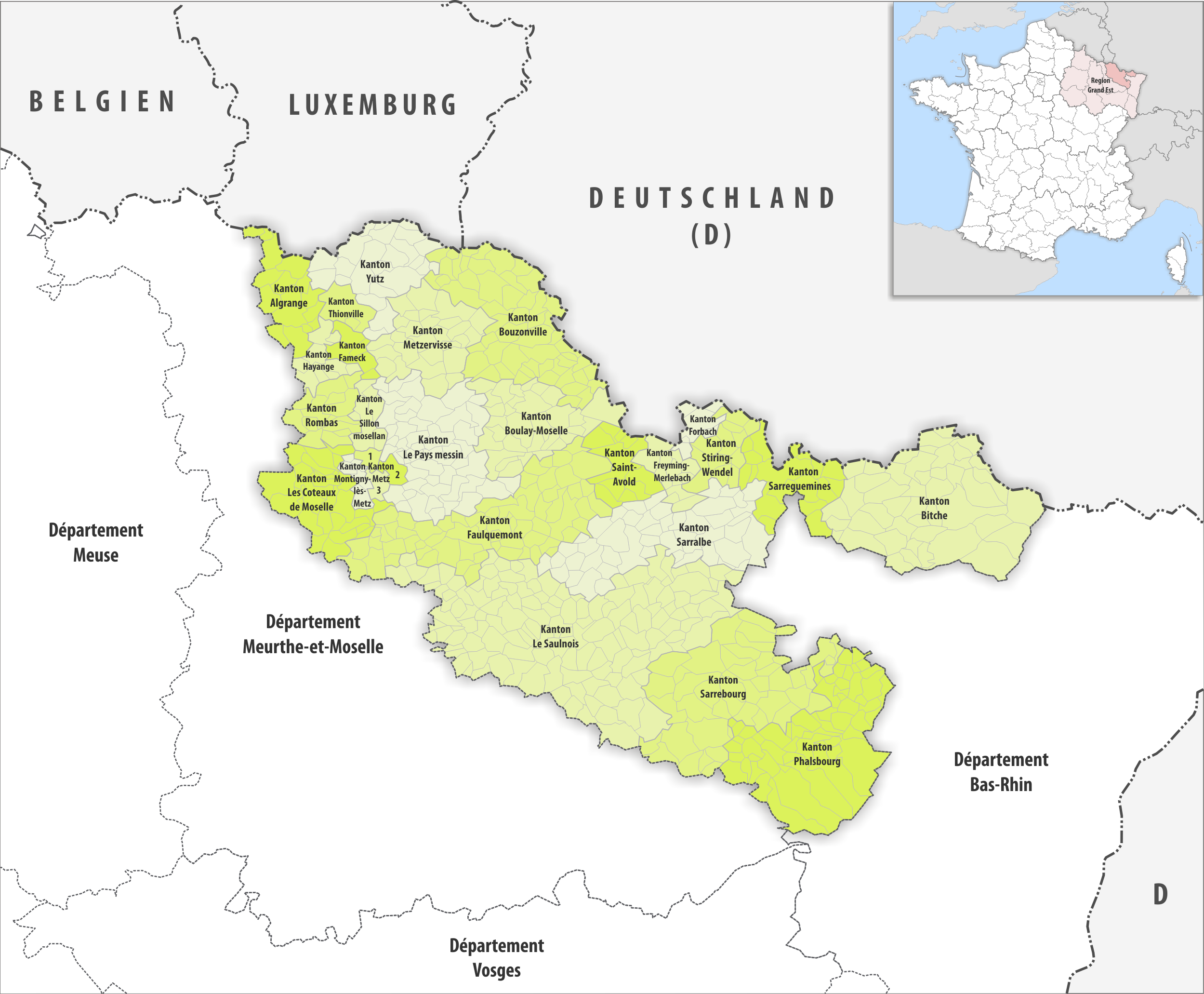 Gemeinden und Kantone im Departement Moselle